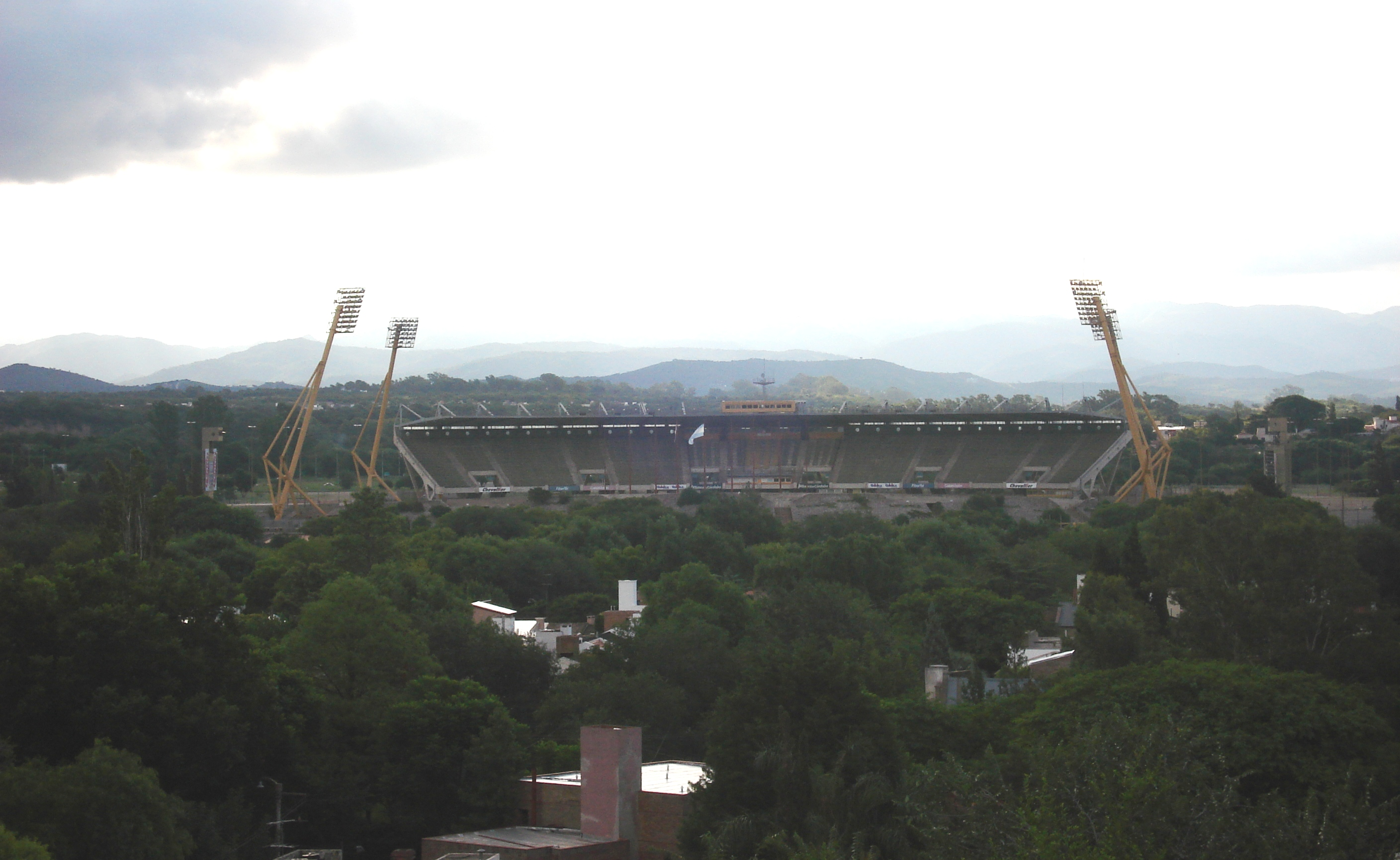 Estadio mundialista de la Ciudad de Córdoba en la República Argentina